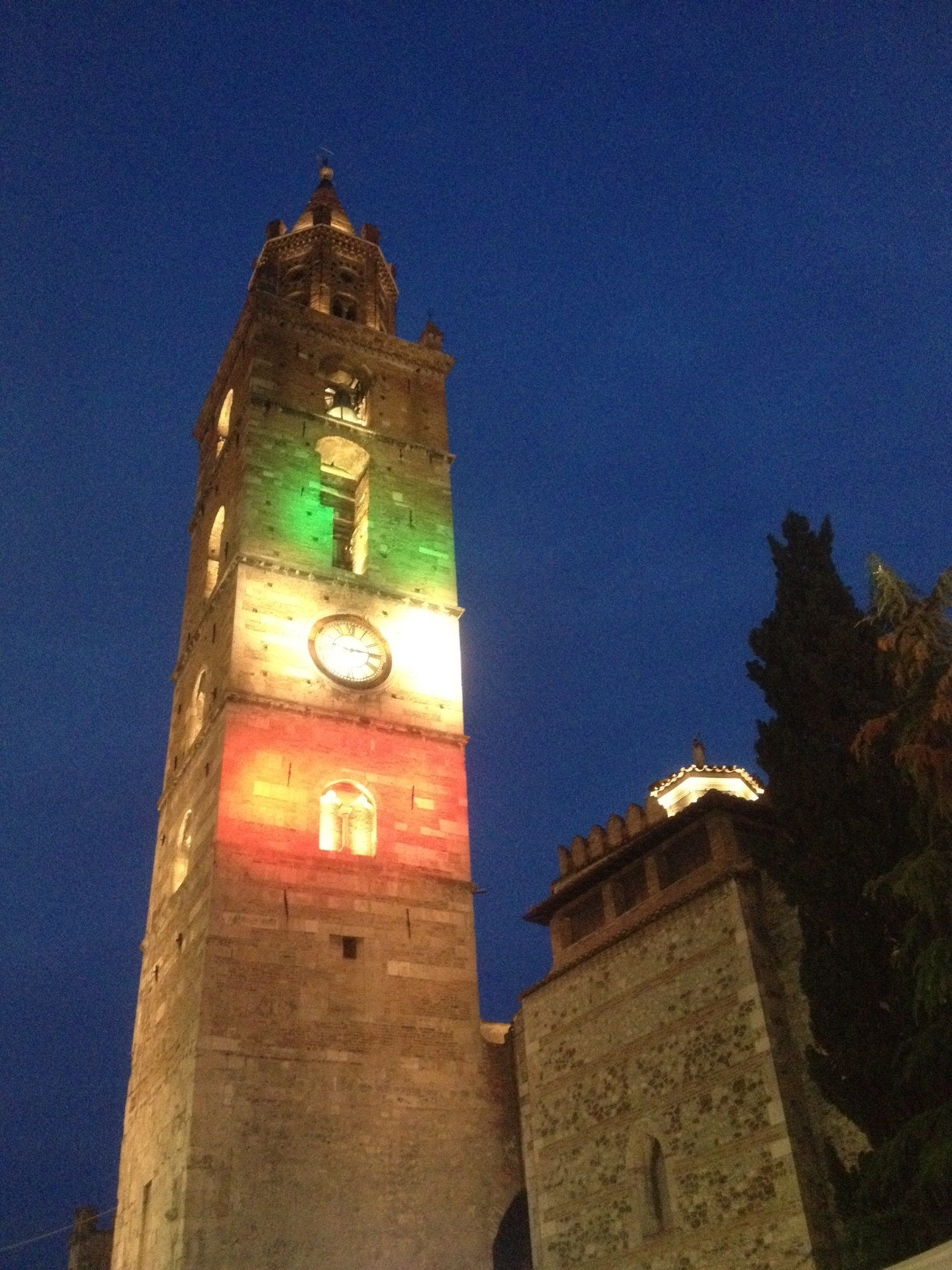 La Torre del Duomo in occasione della Parata Inaugurale dell'Interamnia World Cup (4 luglio 2012)